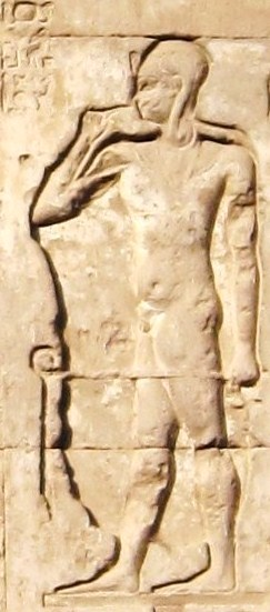 Kindgott Heka-pa-chered in einem Relief des Chnum-Tempels in Esna, Ägypten